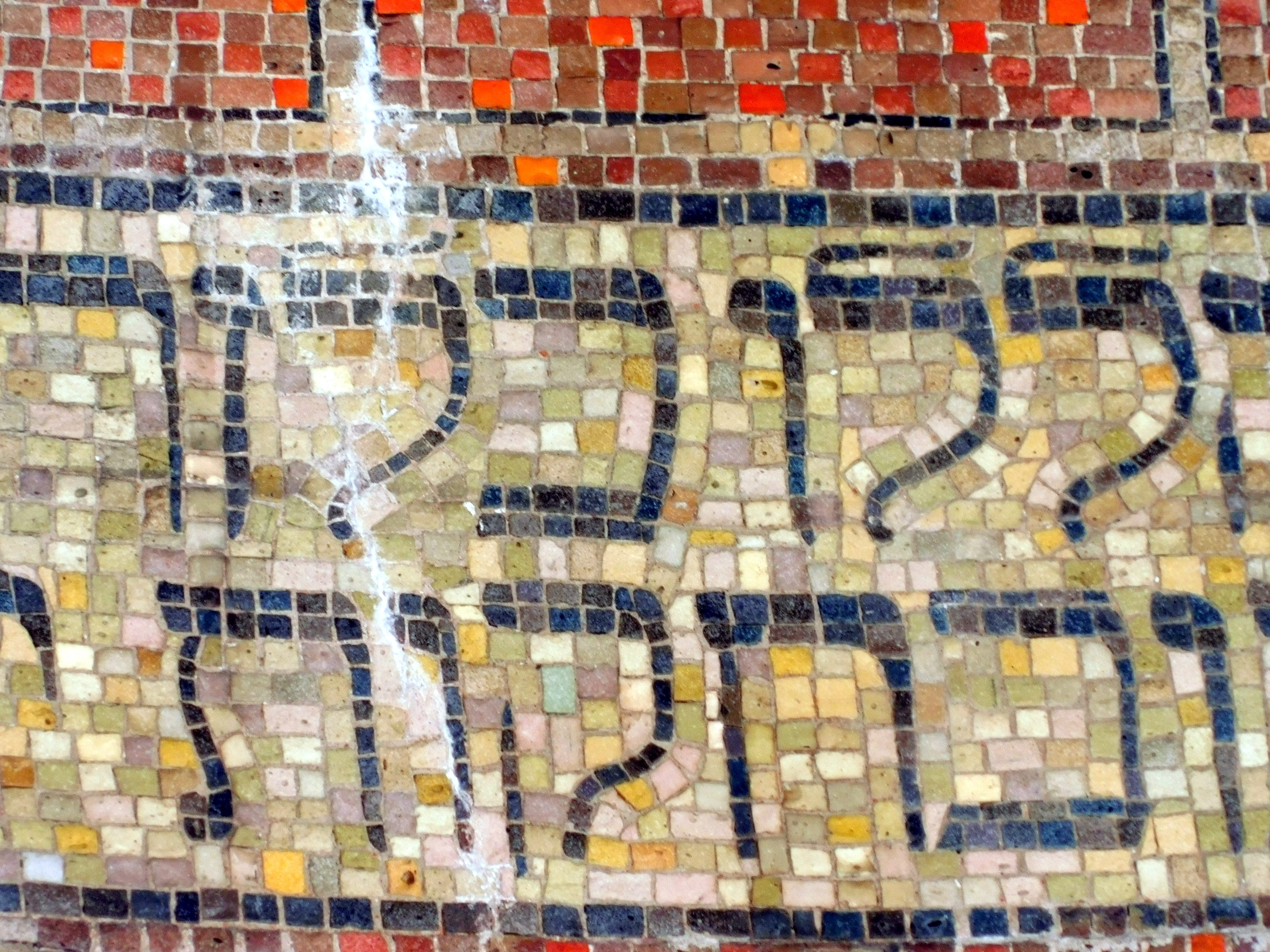 Szczegóły mozaiki na kopule mauzoleum(1)